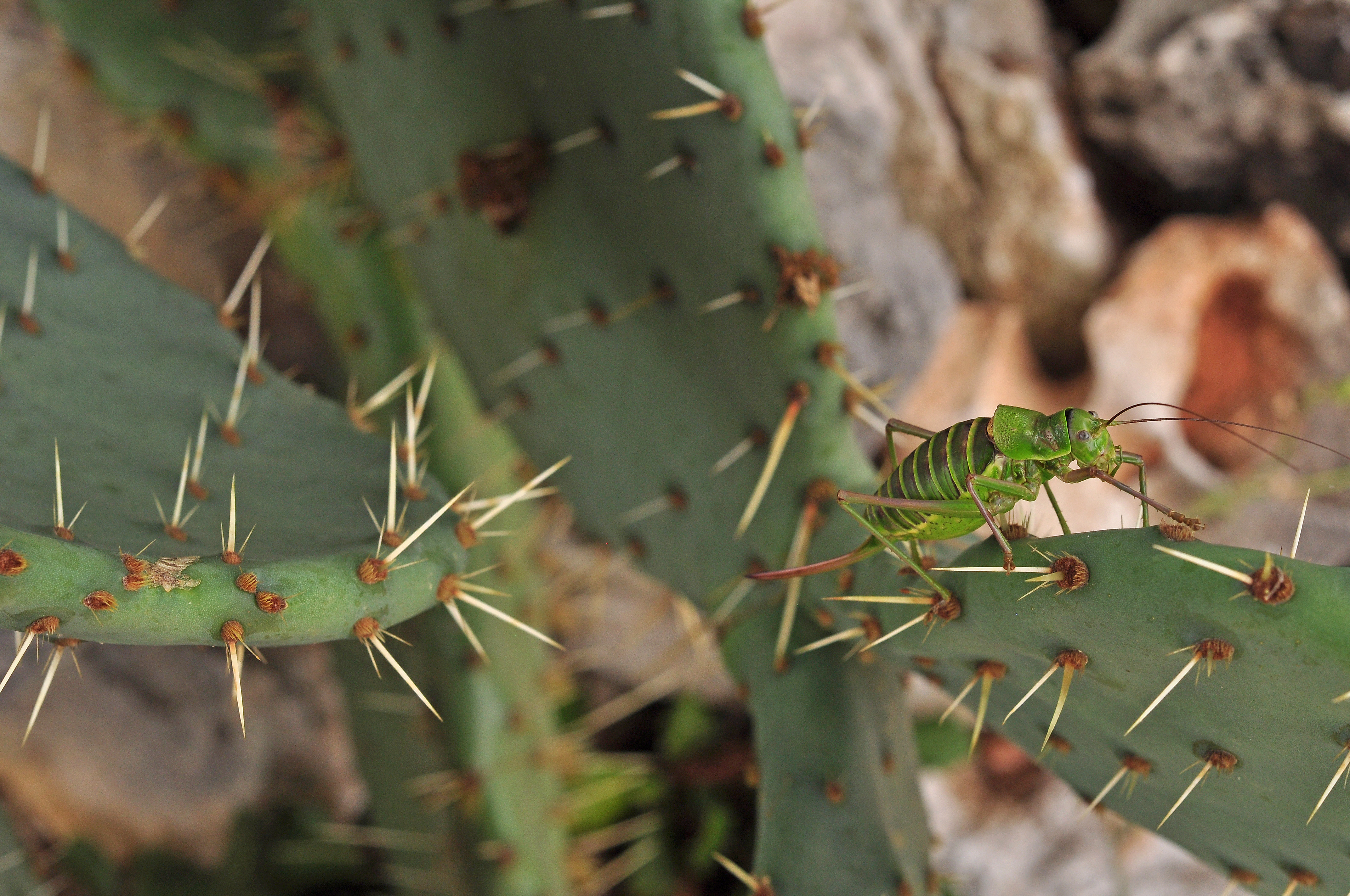 Cette photo est prise en Garrigue Nîmoise.(POULX) Femelle sur figuier de barbarie,(Opuntia ficus-indica) Très fréquente en milieu d'été, cette espèce d'orthoptère se confond dans la végétation.Facile à capturer pour observation. Chassée par les faucons, lézards, renards, et chats. Photo faisant partie (collection environnement Gardon) par Gérard JOYON.